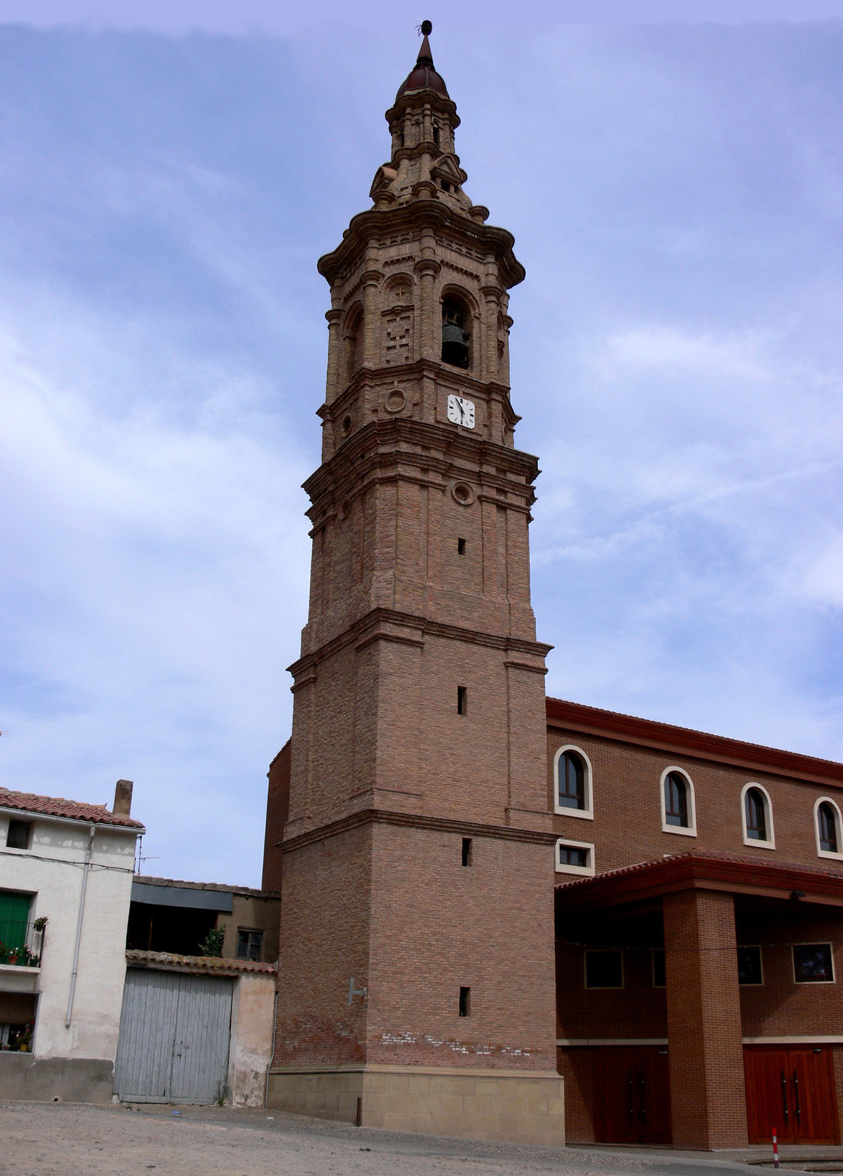 Torre exenta de la iglesia de Santa María en Pradejón (La Rioja, España)